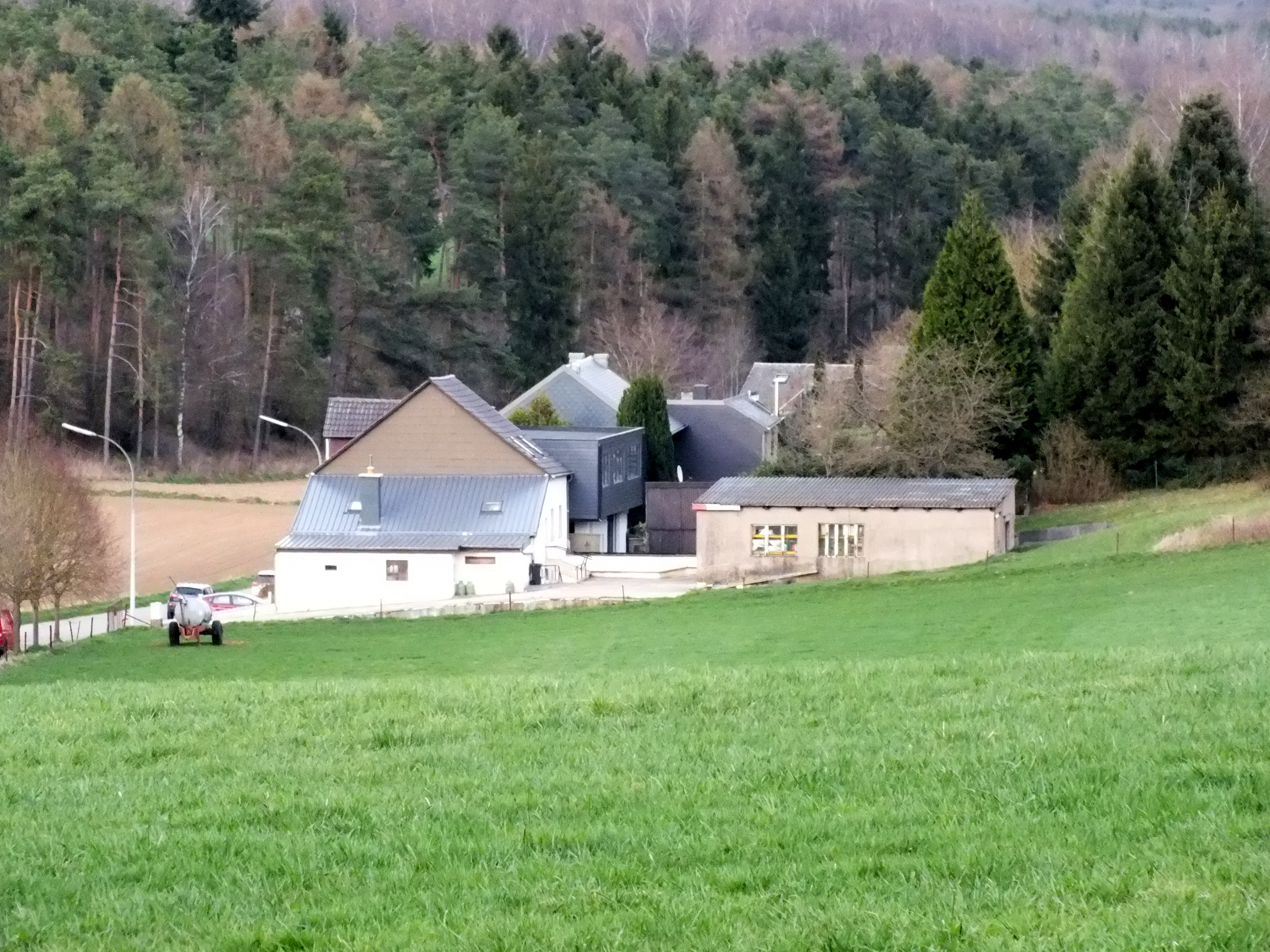 Vue vum Kapellebierg zu Sandweiler op de Bireler Gronn.